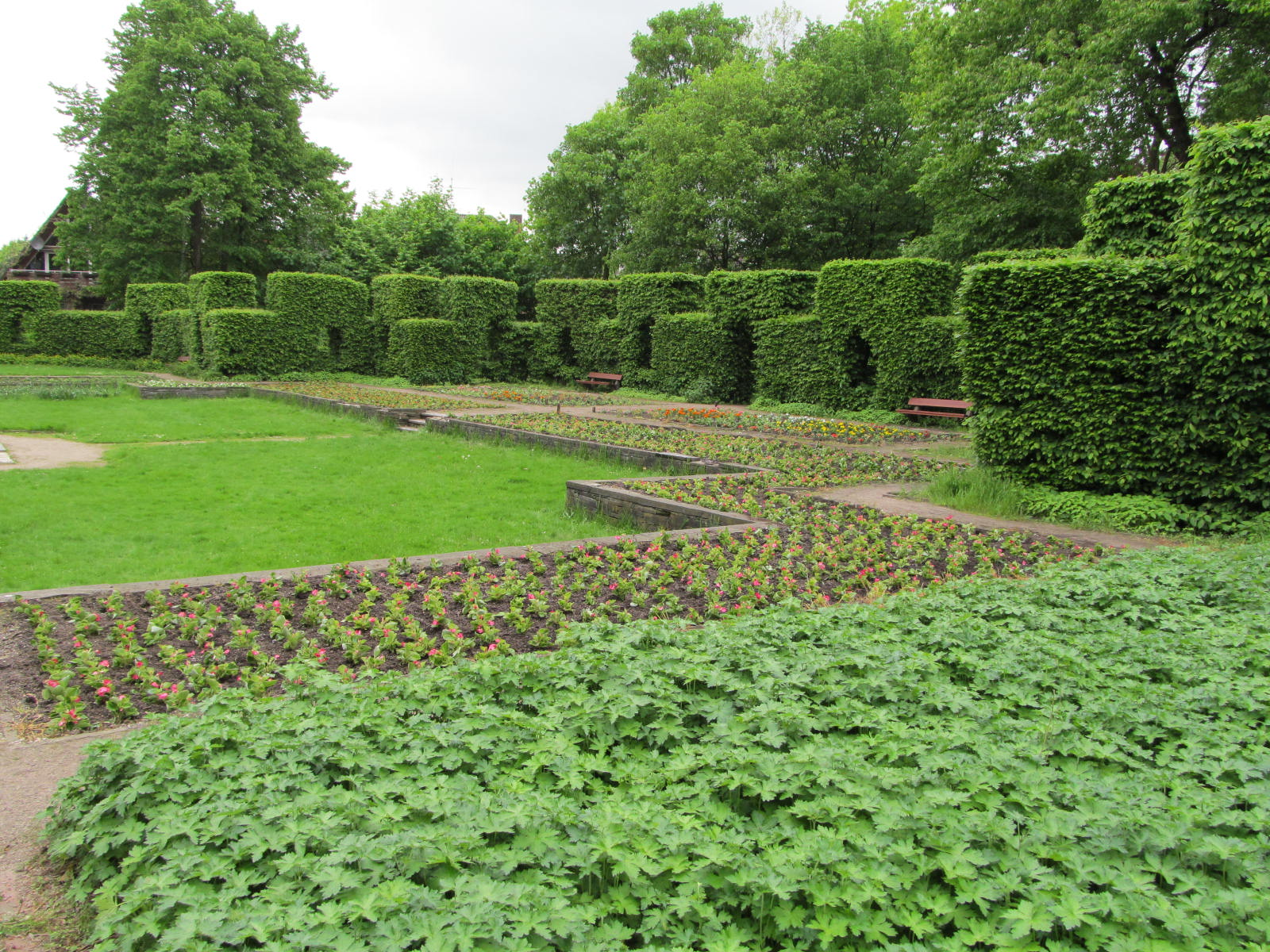 Hammer Park in Hamburg-Hamm, Heckengarten